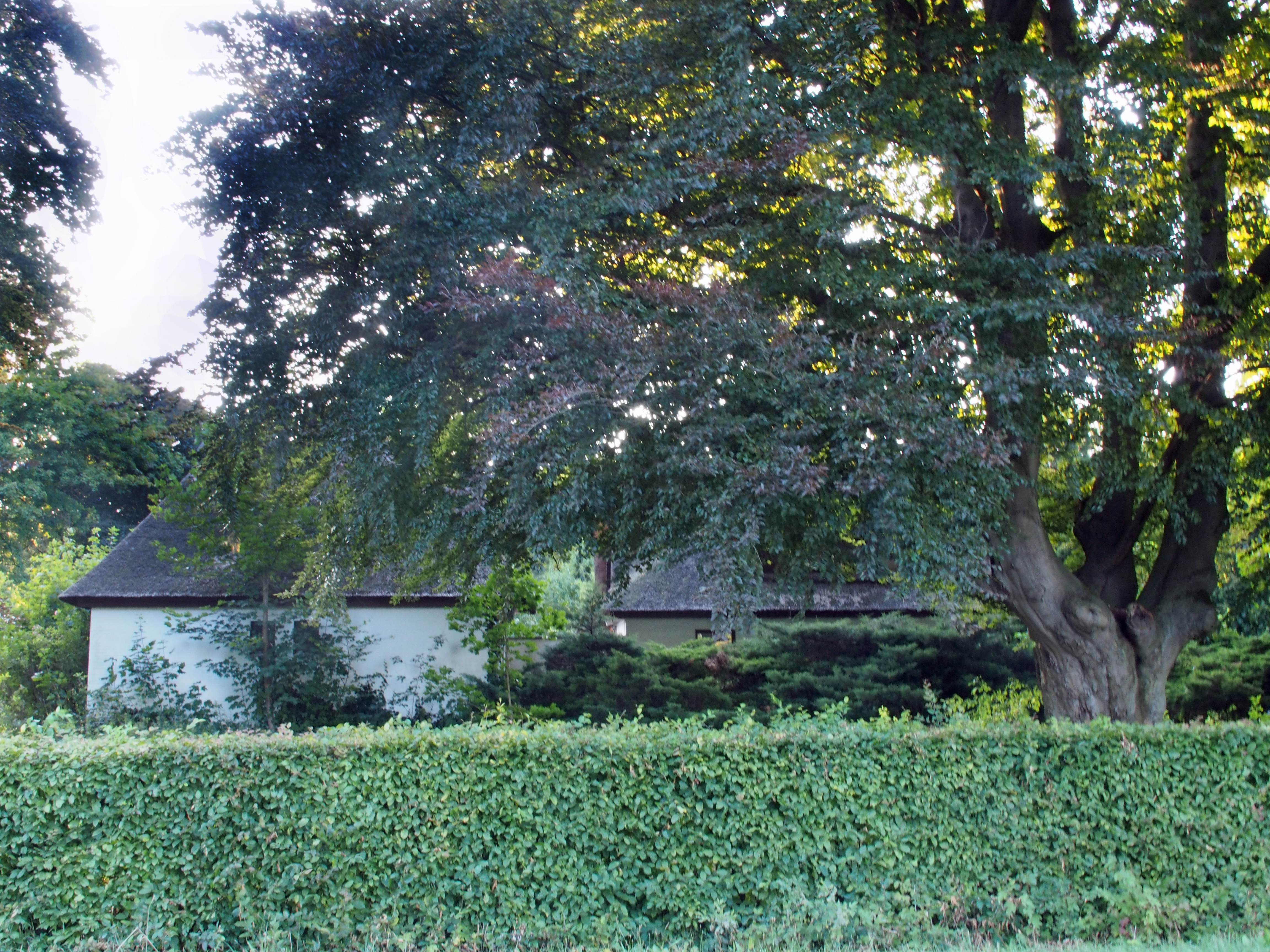 Reetgedecktes Wohnhaus in Hermannsburg, Gut Oldendorf, Niedersachsen